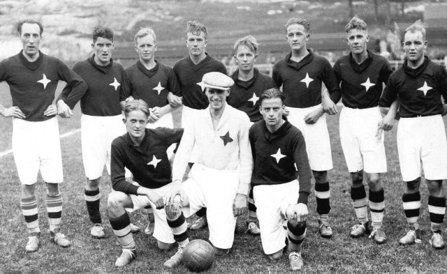 HIFK:n jalkapallon Suomen-mestarijoukkue 1930. Ylärivi vasemmalta: Gunnar Åström, Alfons Nylund, Axel Lindbäck, Jarl Malmgren, Torsten Svanström, Torsten Lindholm, Holger Salin ja Ragnar Lindbäck. Eturivissä vasemmalta: Frans Karjagin, (mv.) Charles Holmberg ja Gösta Lesch.